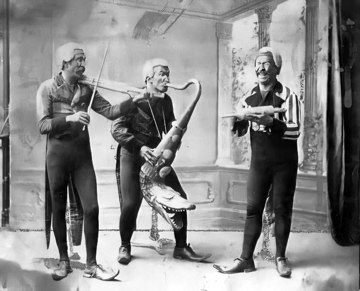 Grupo español de música, activo entre 1874 y 1899. Actuaban con instrumentos informales, interpretando fragmentos de música clásica y popular.